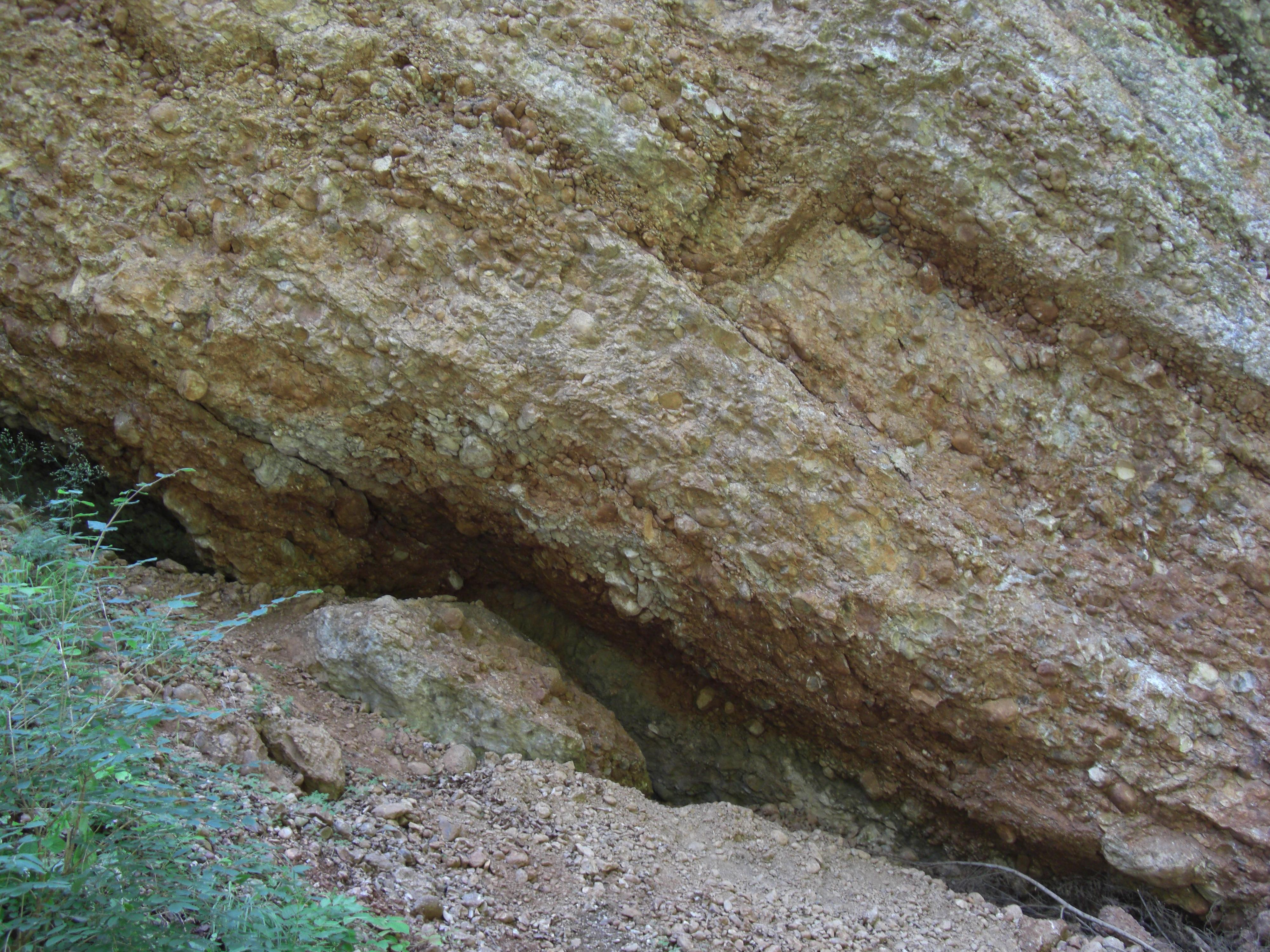 Rote Knollenkalke und Mergel in der Glasenbachklamm